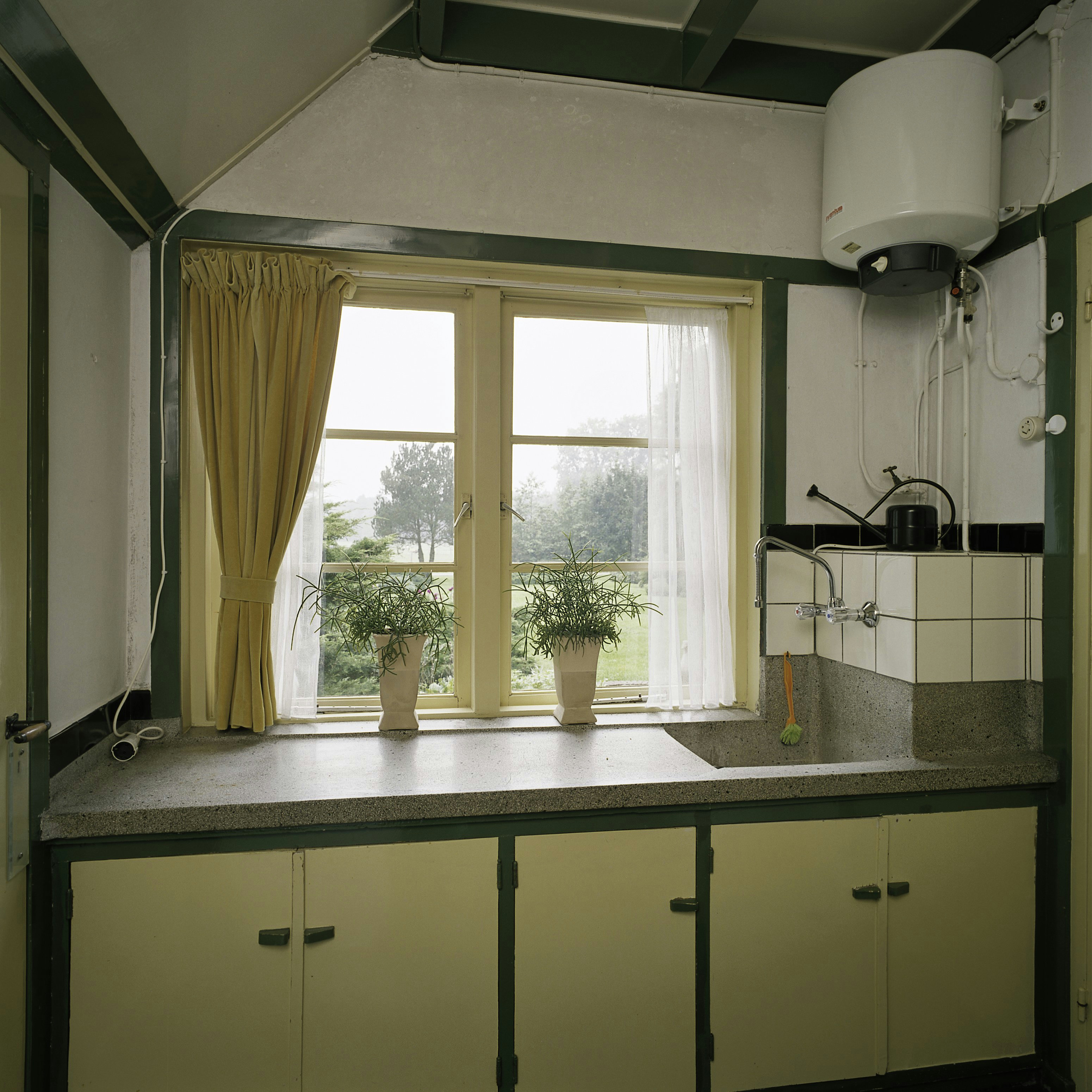 Aanrecht/ Keuken: Interieur, overzicht van het aanrecht met kastjes in de keuken